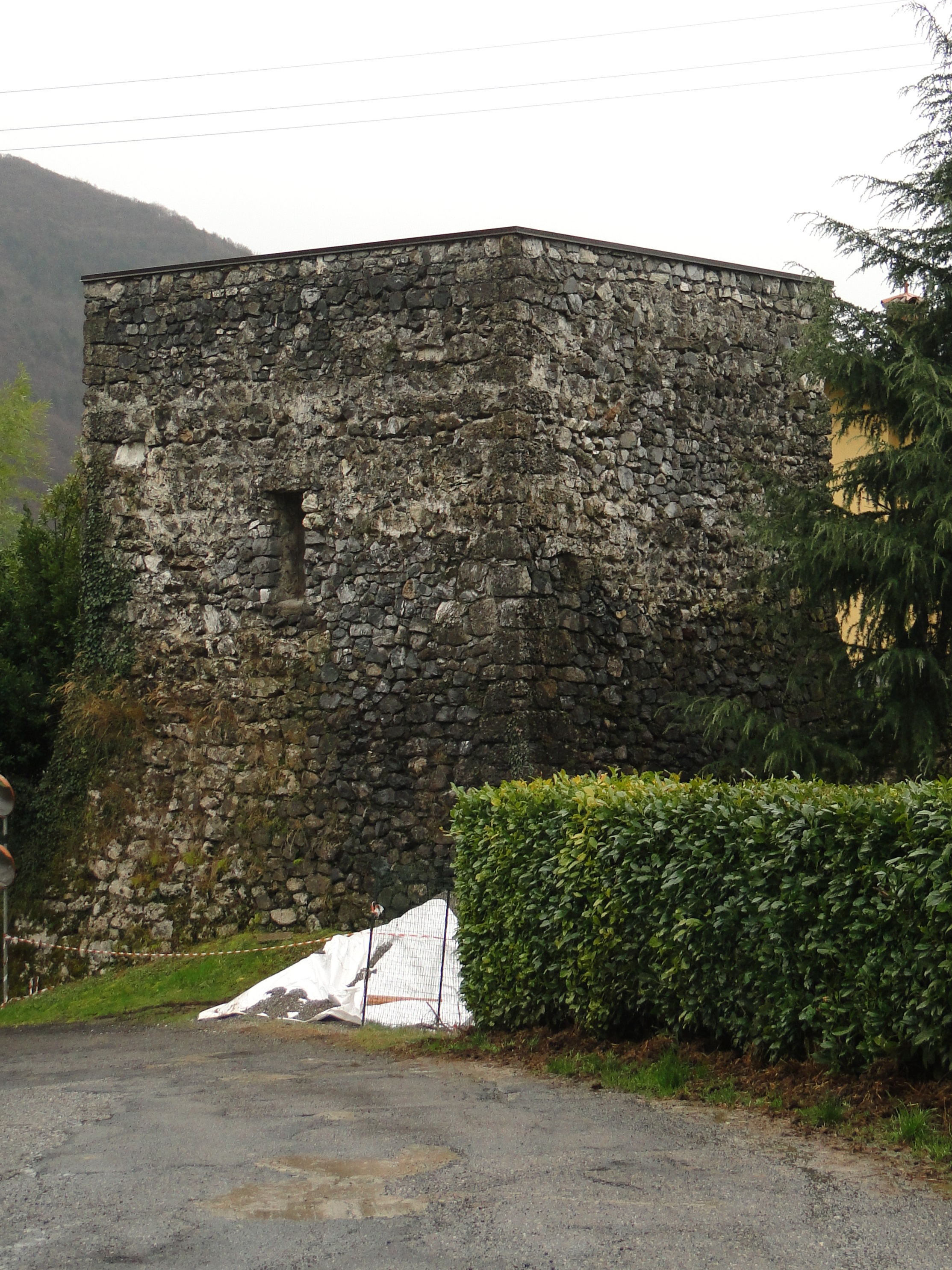 Cirano, fraz. di Gandino (BG). Torre in località En Caster